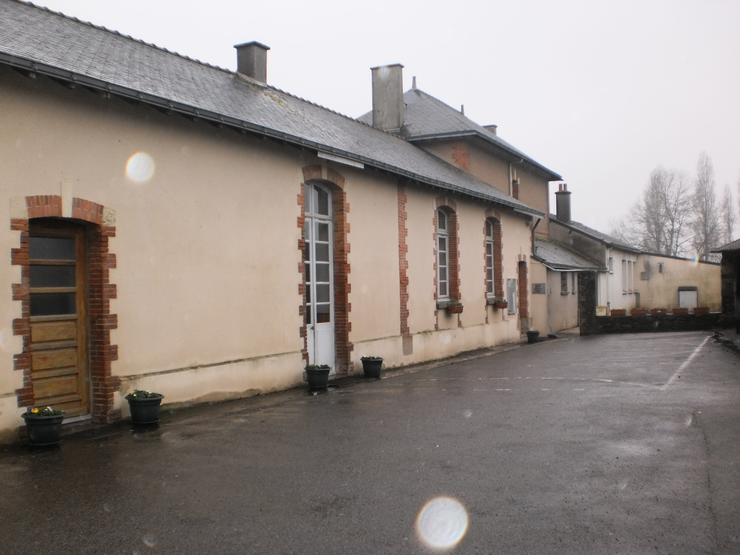 Pouillé-les-Côteaux (Loire-Atlantique, France) - mairie